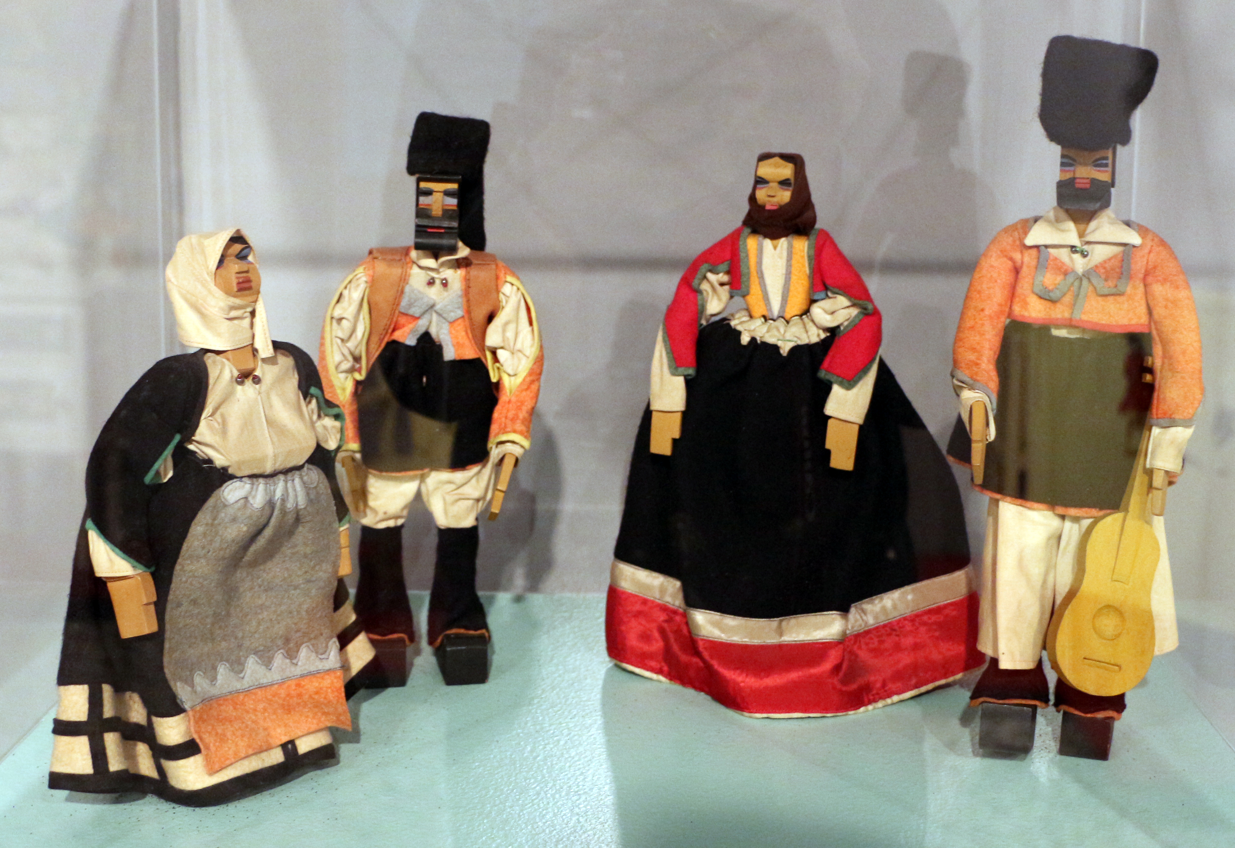 Il parco e i musei di Nervi This is a photo of a monument which is part of cultural heritage of Italy.